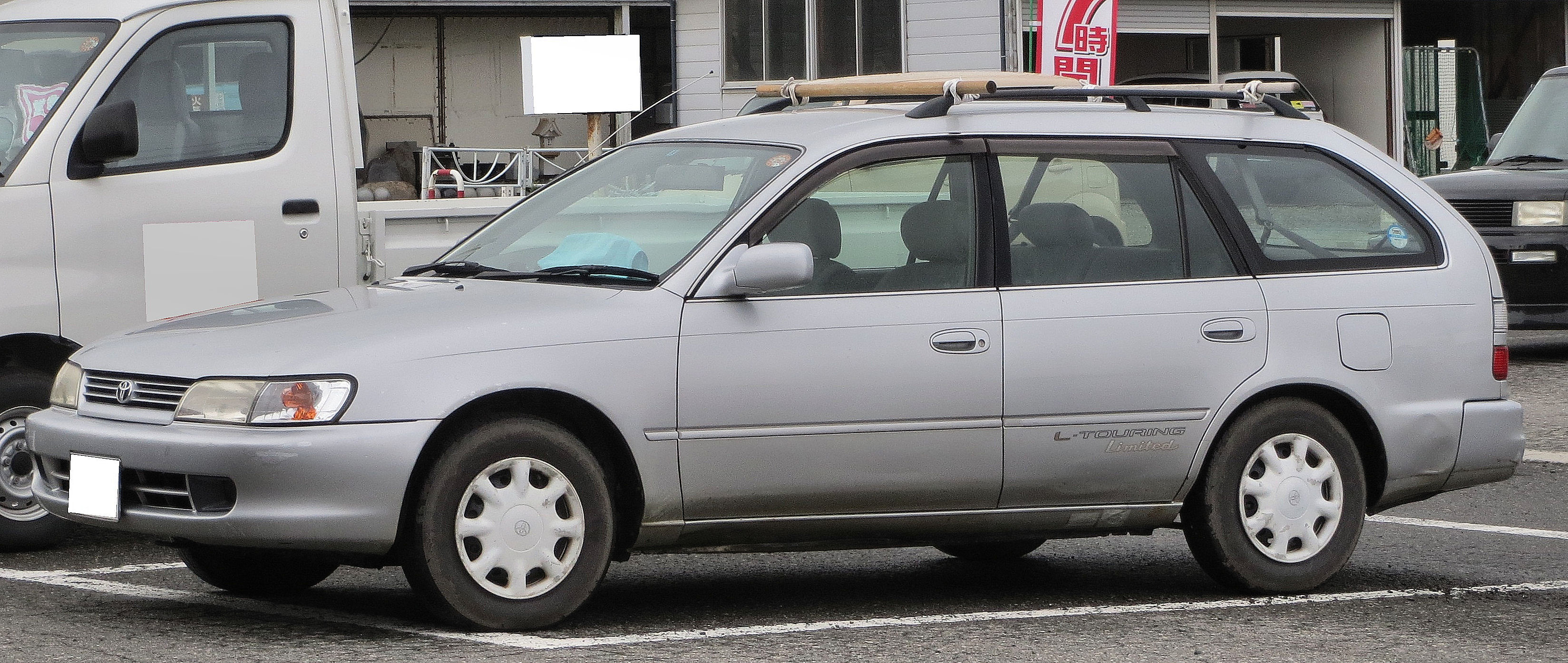 トヨタ カローラワゴン 1.6Lツーリングリミテッド4WD （1997年4月～2000年8月）